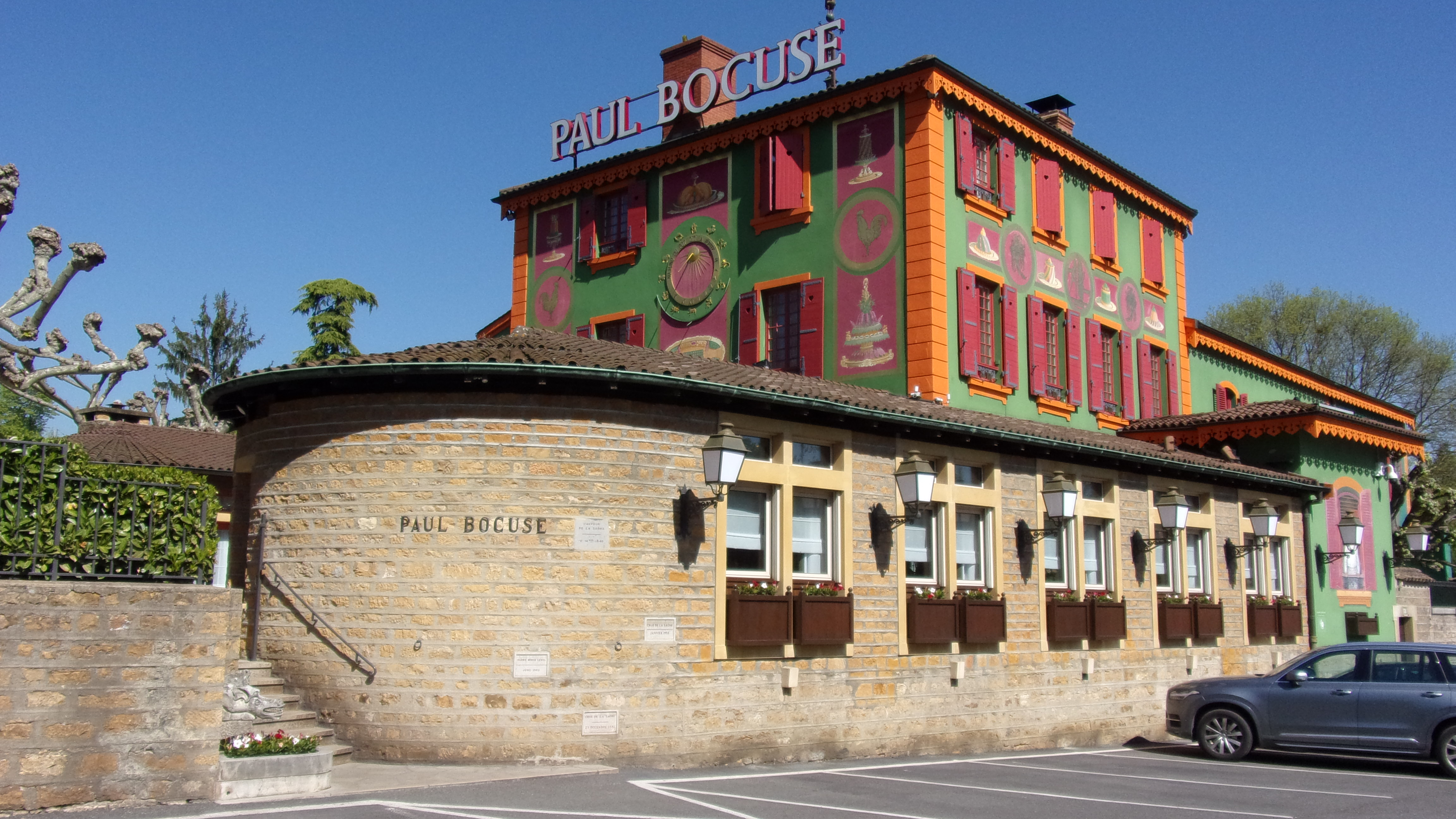 Auberge de Paul Bocuse.